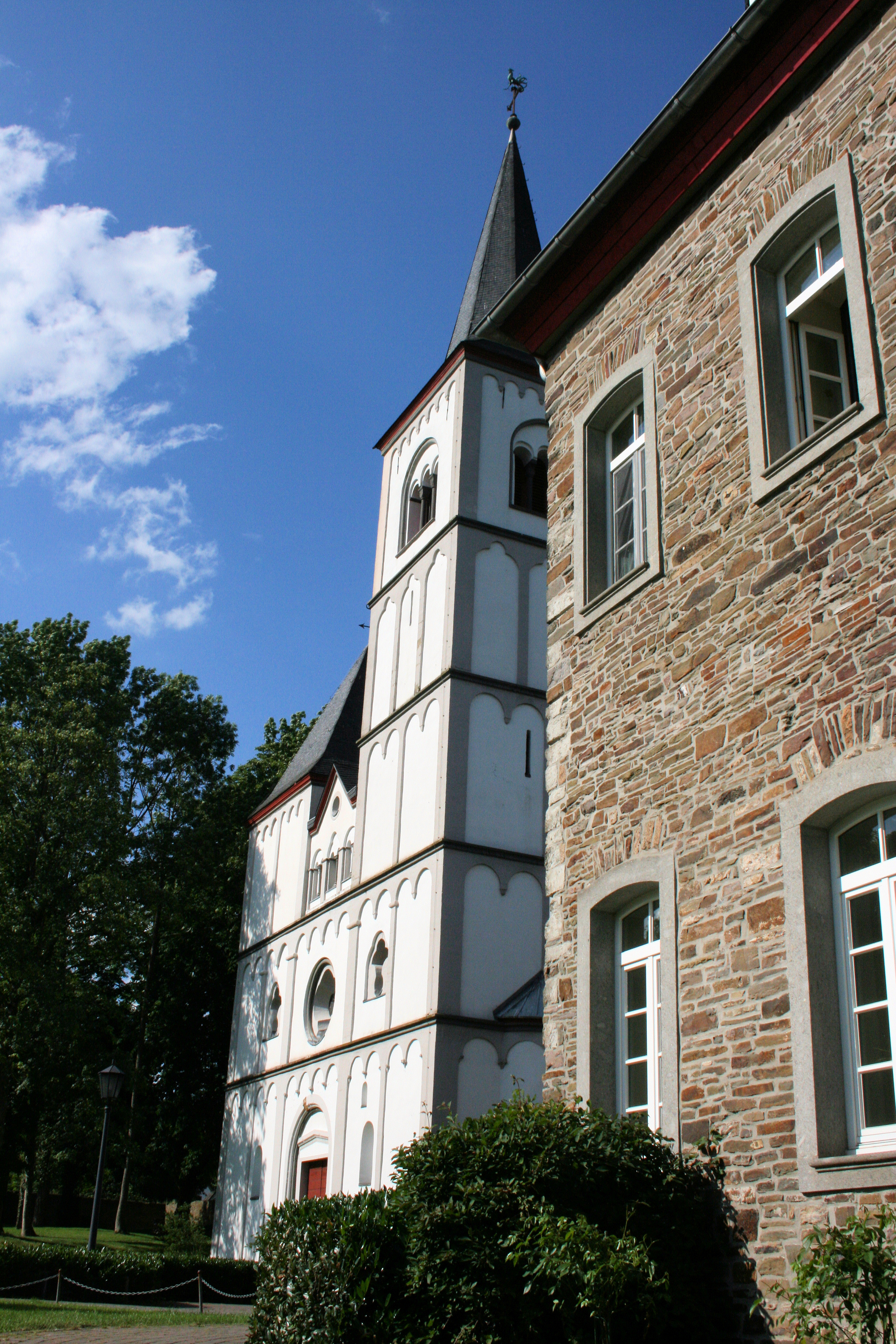 Sankt Agnes in Eitorf-Merten